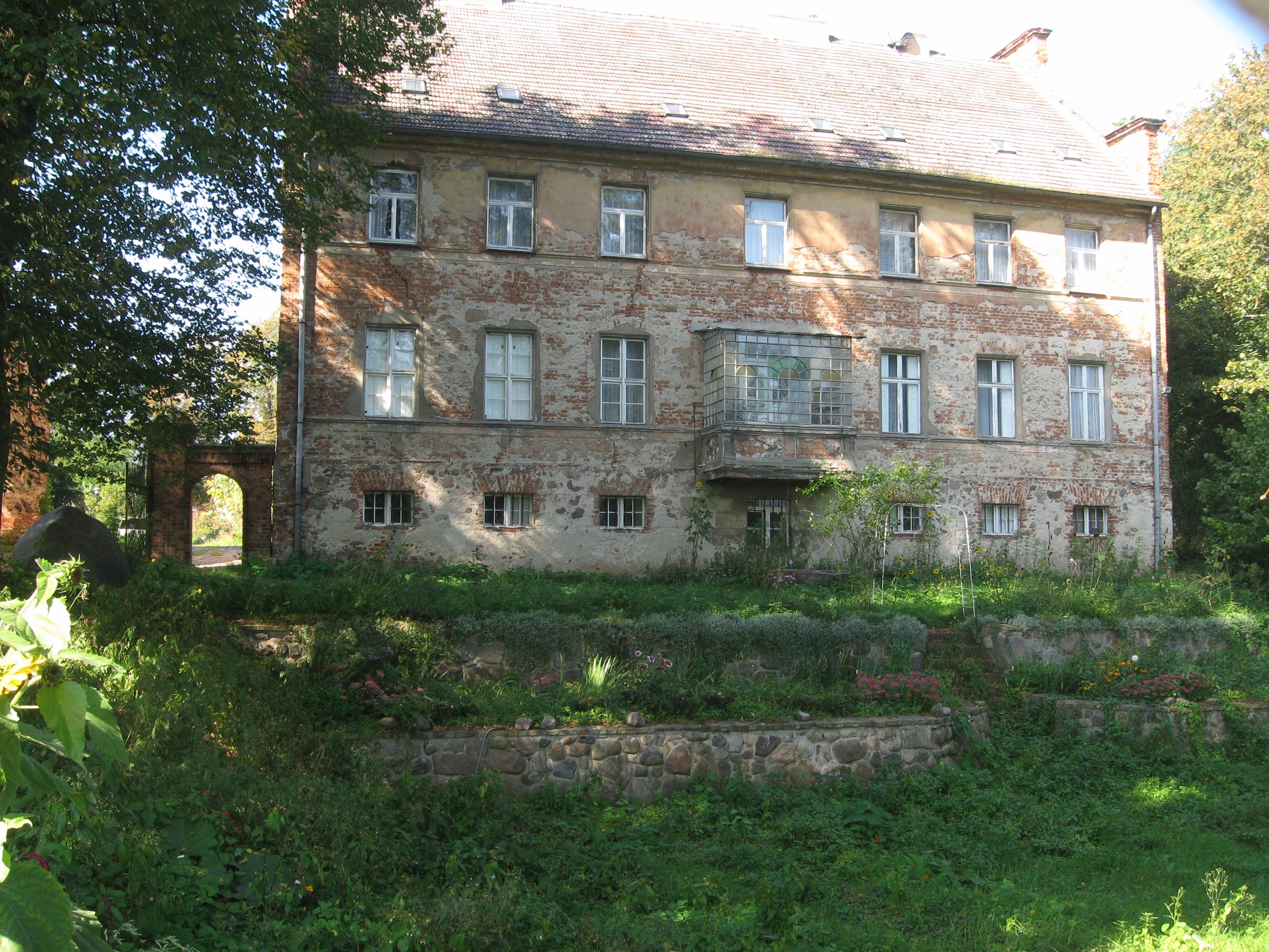 Teil der unter Denkmalschutz stehende Burganlage in Liebenwalde, Amt 2